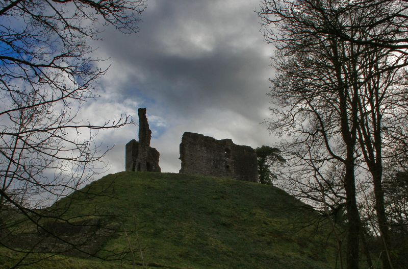 Okehampton Castle